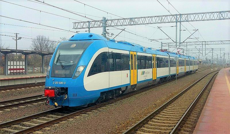 Elektryczny zespół trakcyjny 14WE-03 w barwach Kolei Śląskich stoi na stacji Skierniewice podczas powrotu na Śląsk po naprawie przeprowadzonej przez ZNTK Mińsk Mazowiecki.